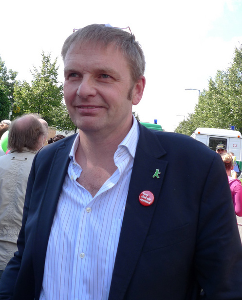 Volker Ratzmann